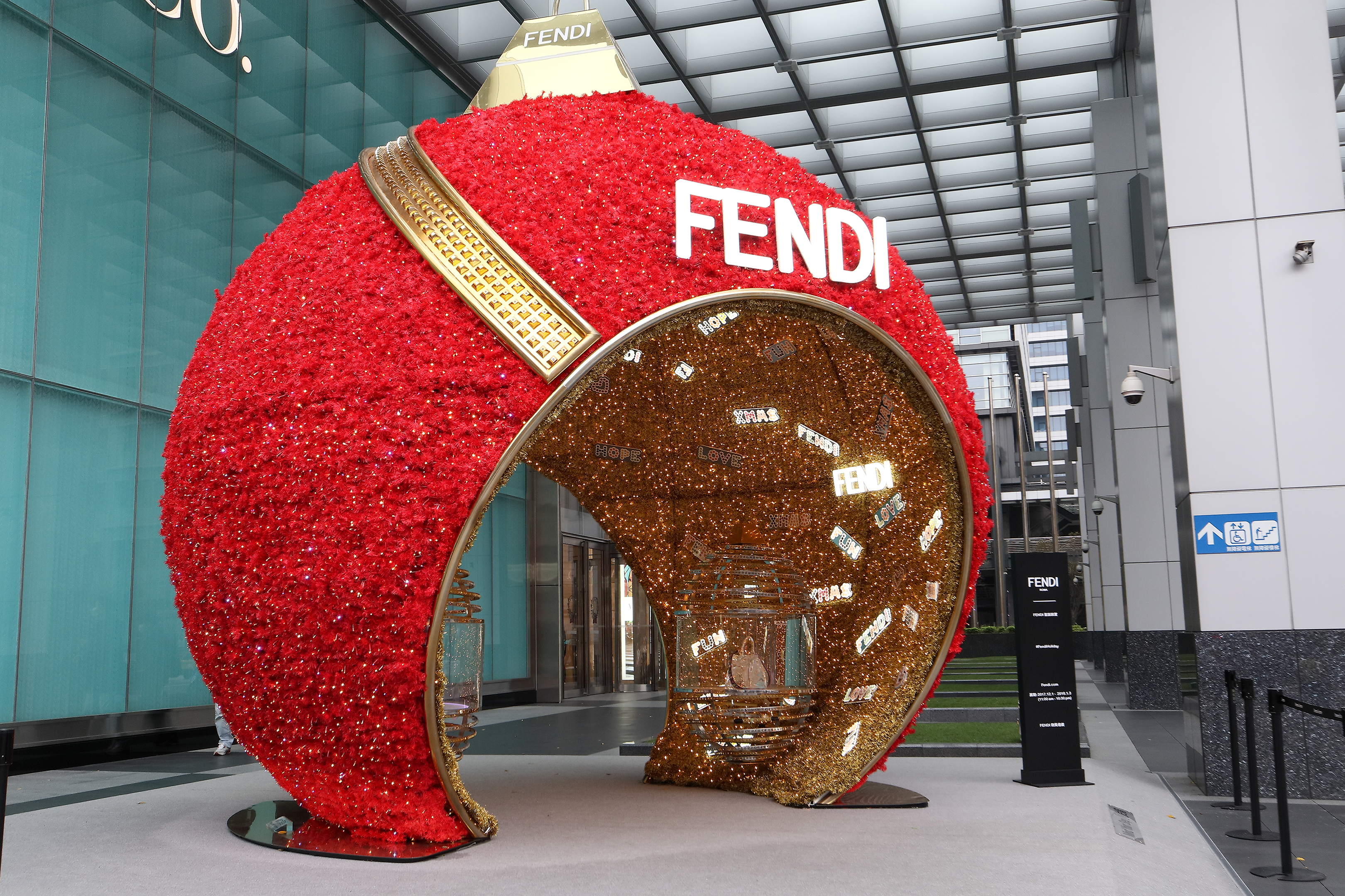 中文（台灣）: Fendi微風信義聖誕裝置。